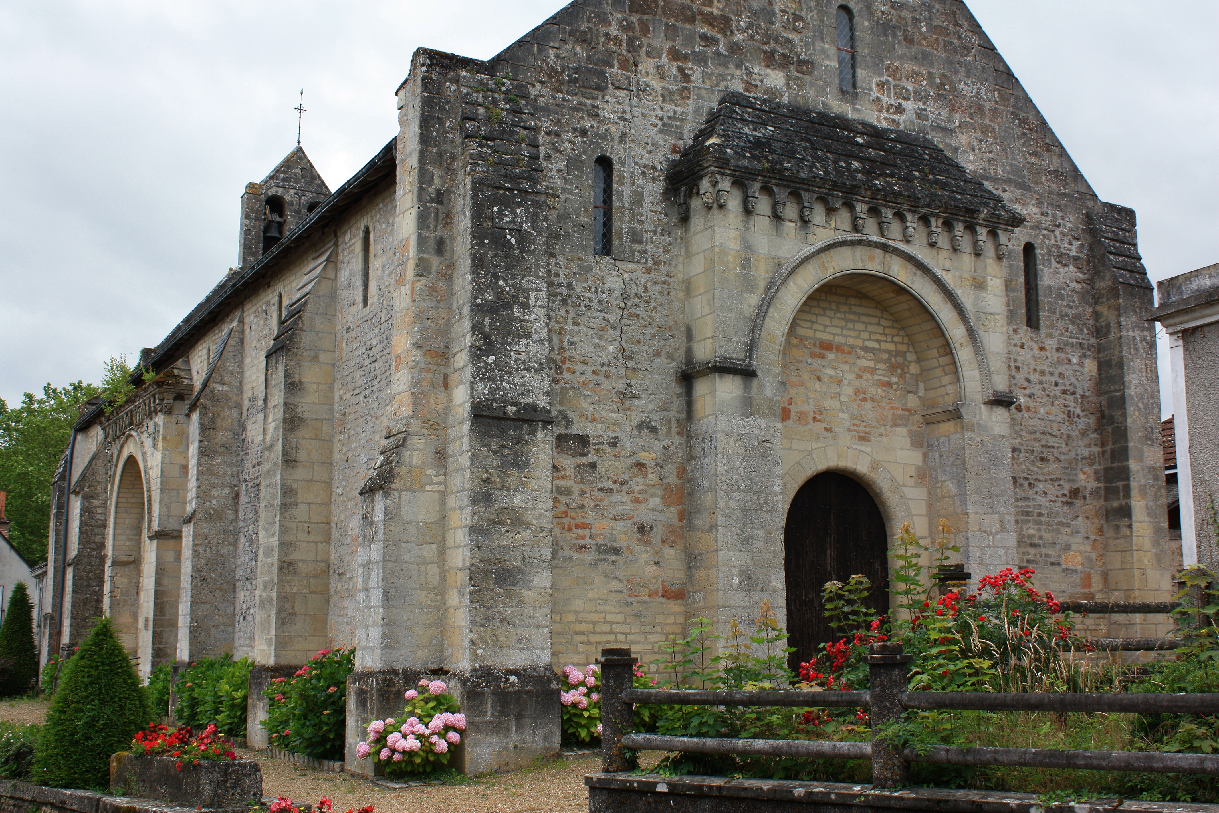 Pont-de-Ruan - Eglise Sainte-Trinité Vue du Nord-Ouest.